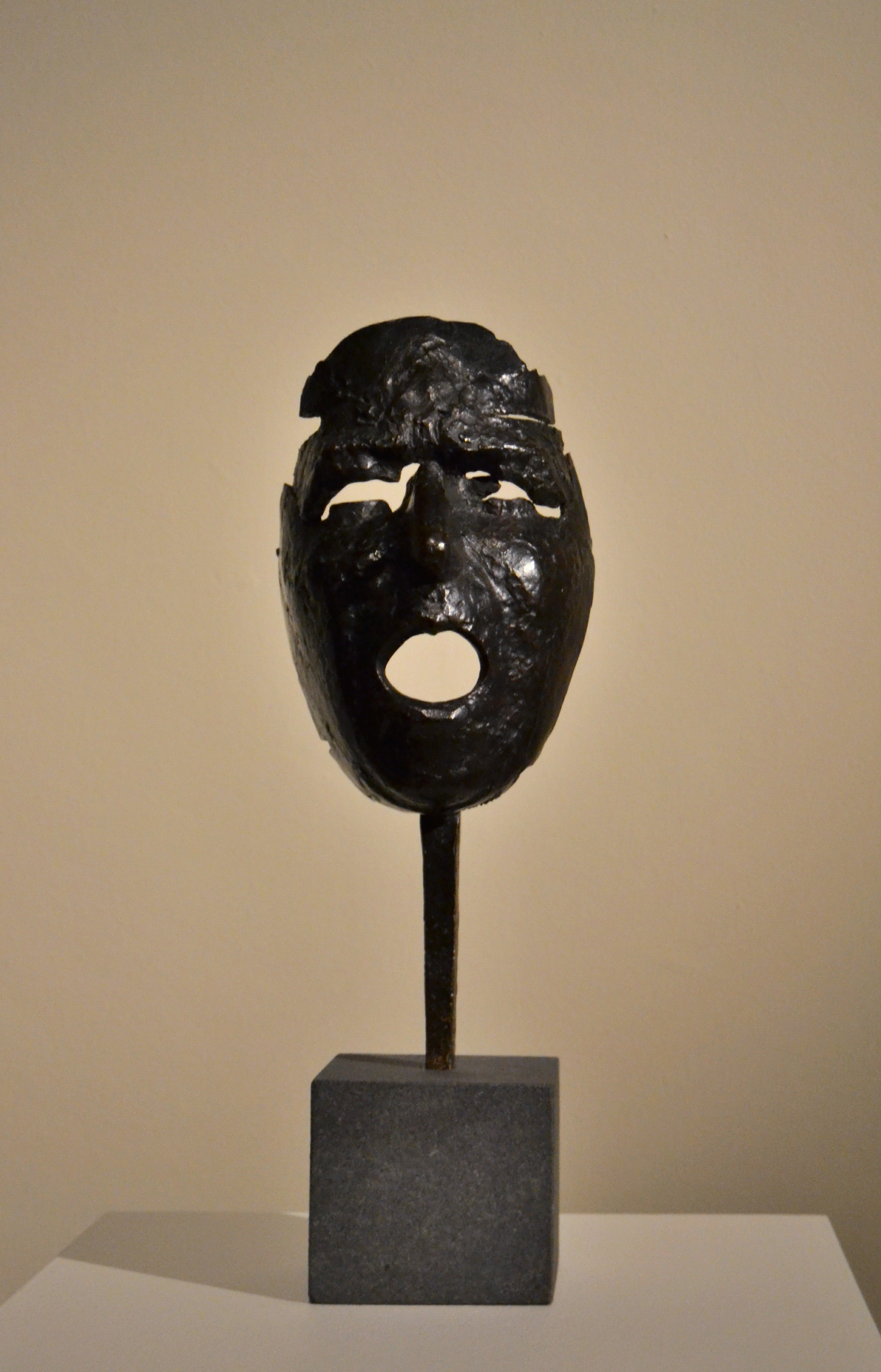 Màscara de Montserrat cridant (Masque de Montserrat criant), Julio González. Bronze fos, 32,8 x 14,9 x 12 cm. Ca. 1938 - 39. Institut Valencià d'Art Modern.